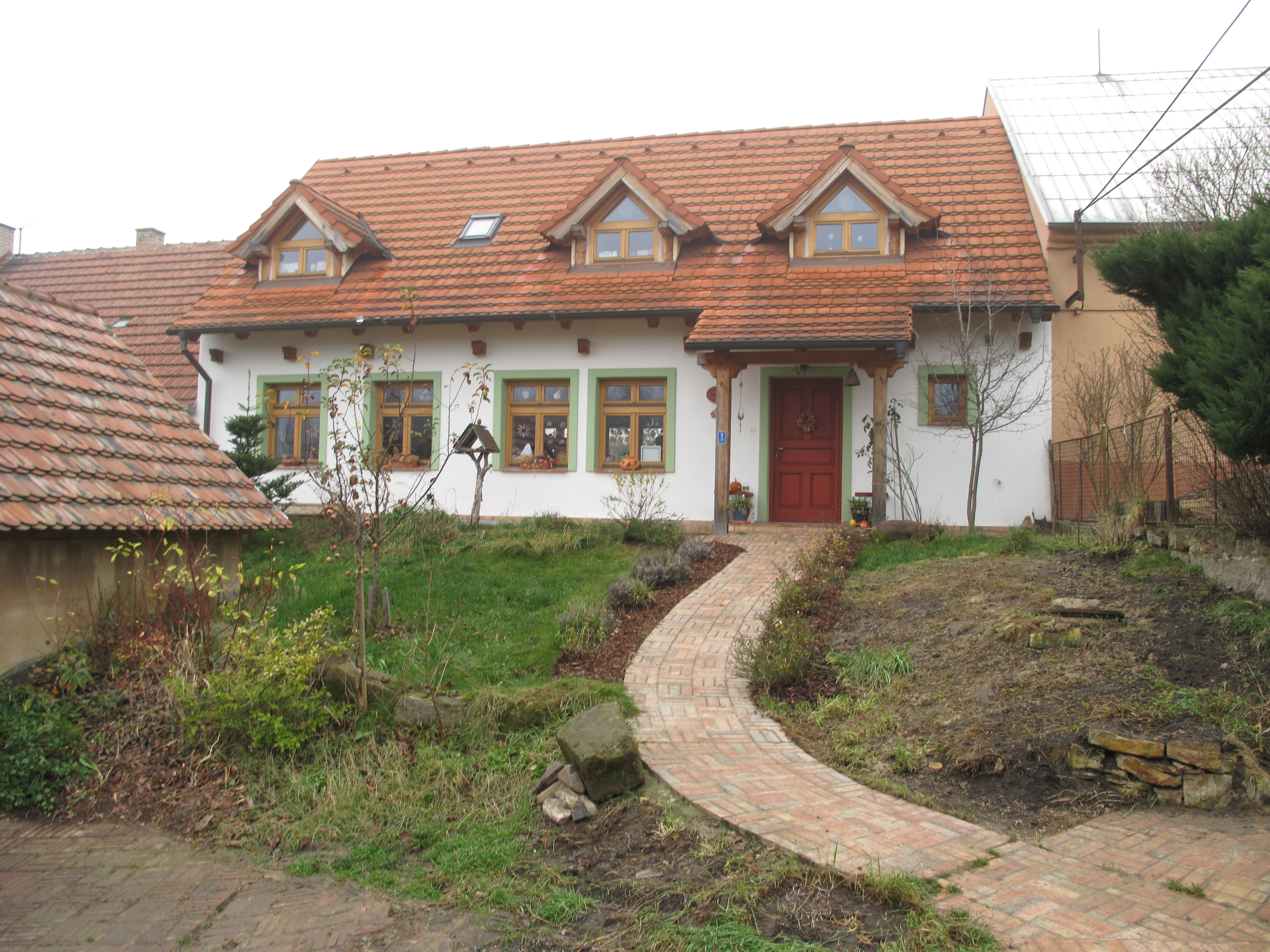 Dům v Pecínově. Okres Rakovník, Česká republika.